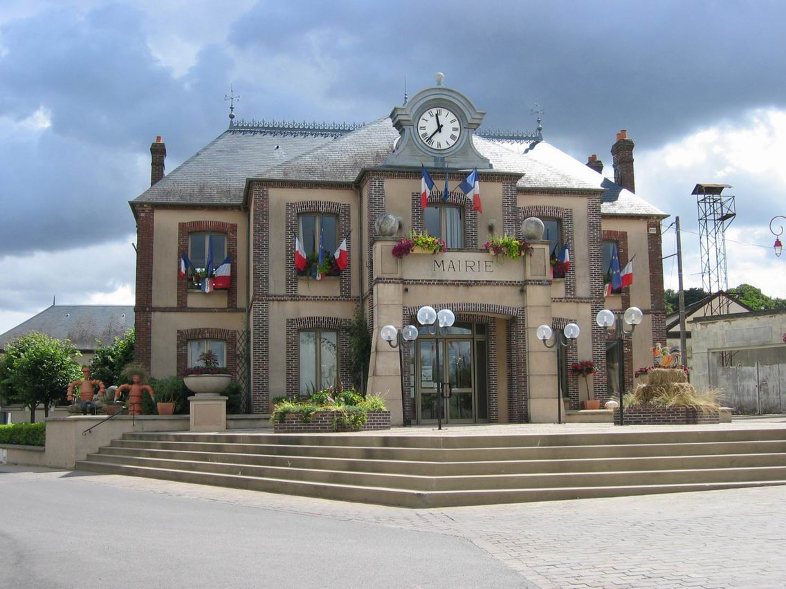 MAIRIE DE COURTENAY 1 place Honoré Combe 45320 Courtenay